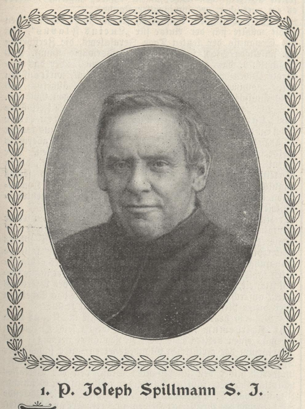 Dr. Joseph Spillmann, Jesuit und Volksschriftsteller